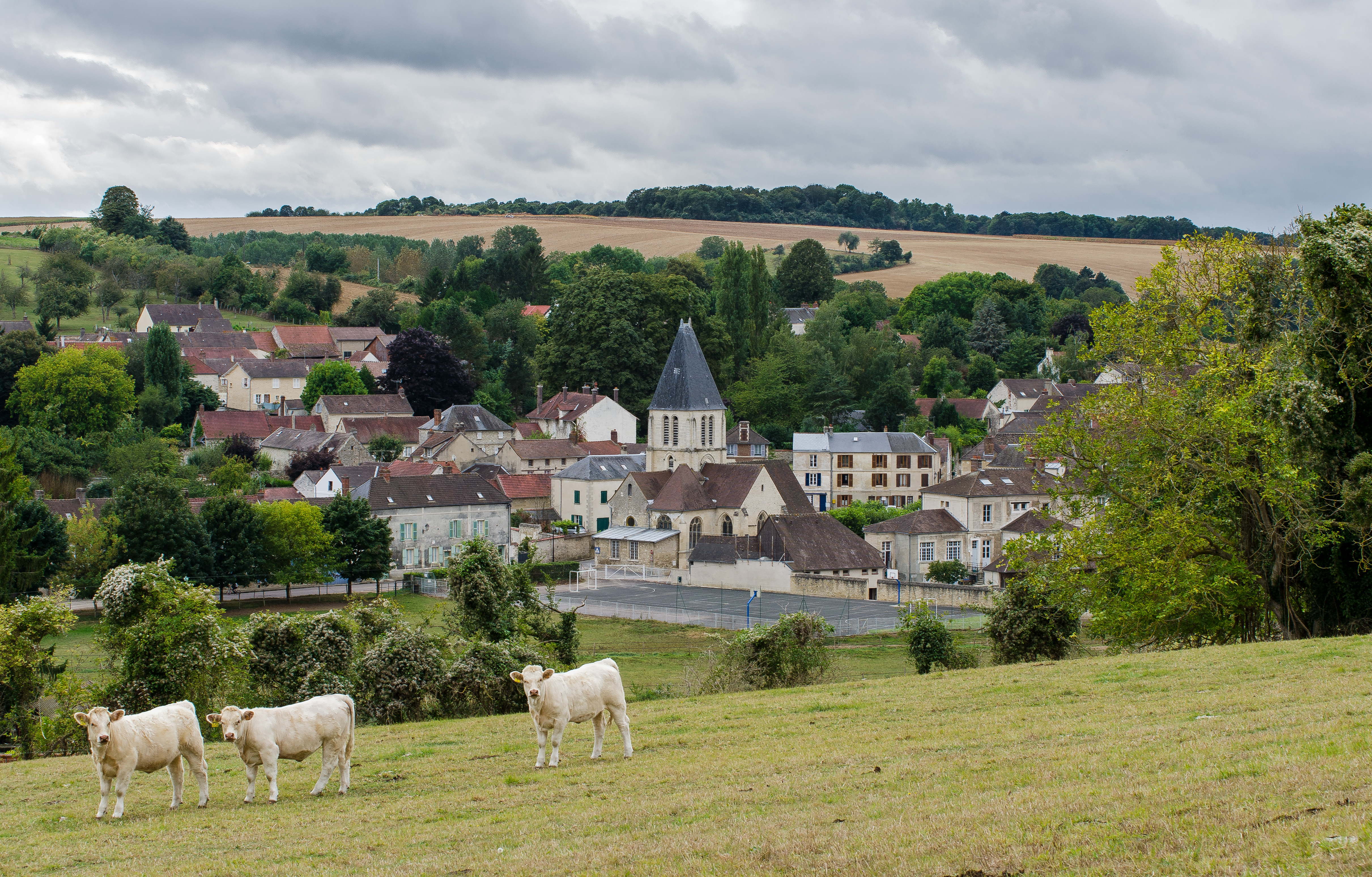 Vue générale de Chaussy, dans le Vexin français (Val d'Oise).